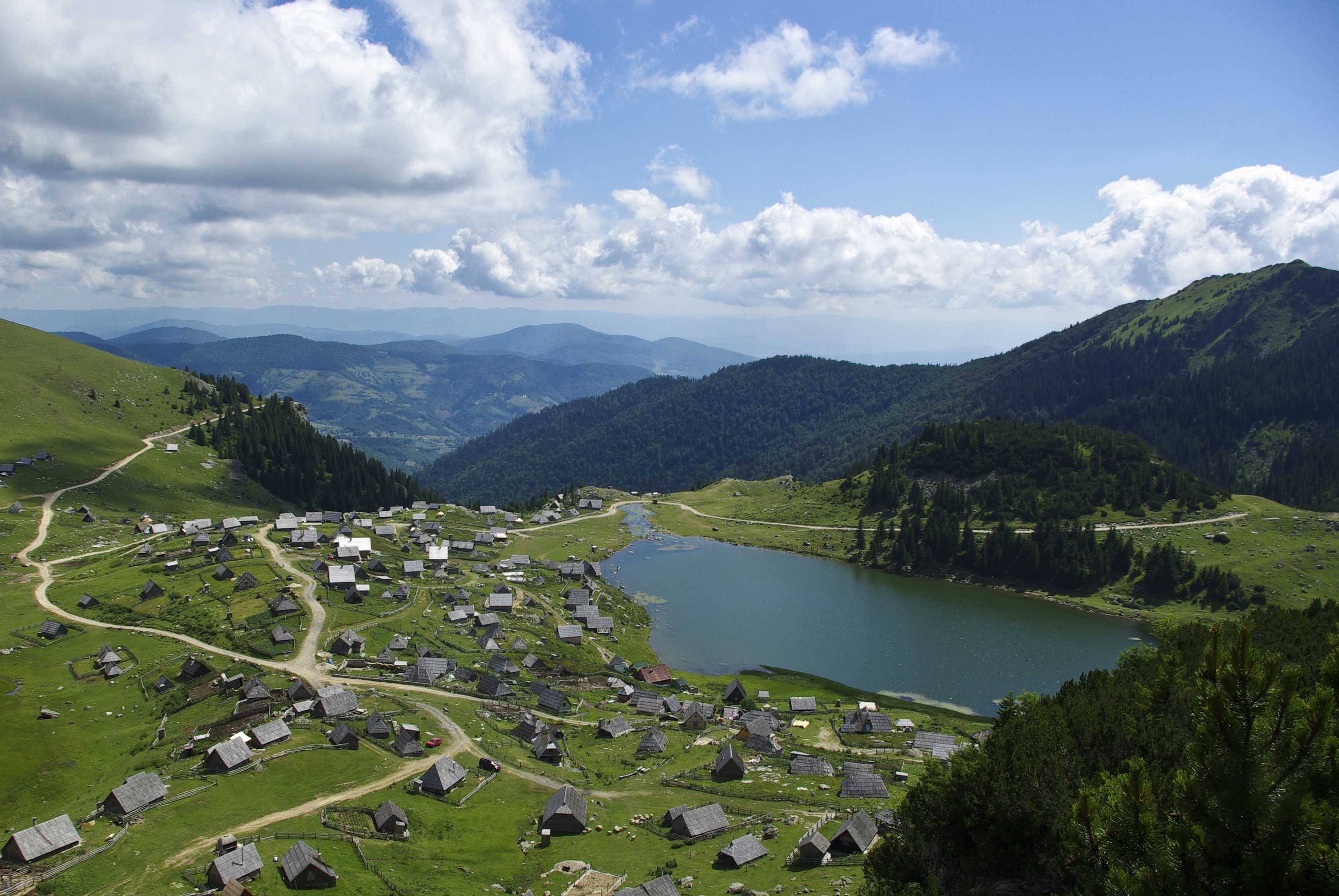 Prokoško jezero.